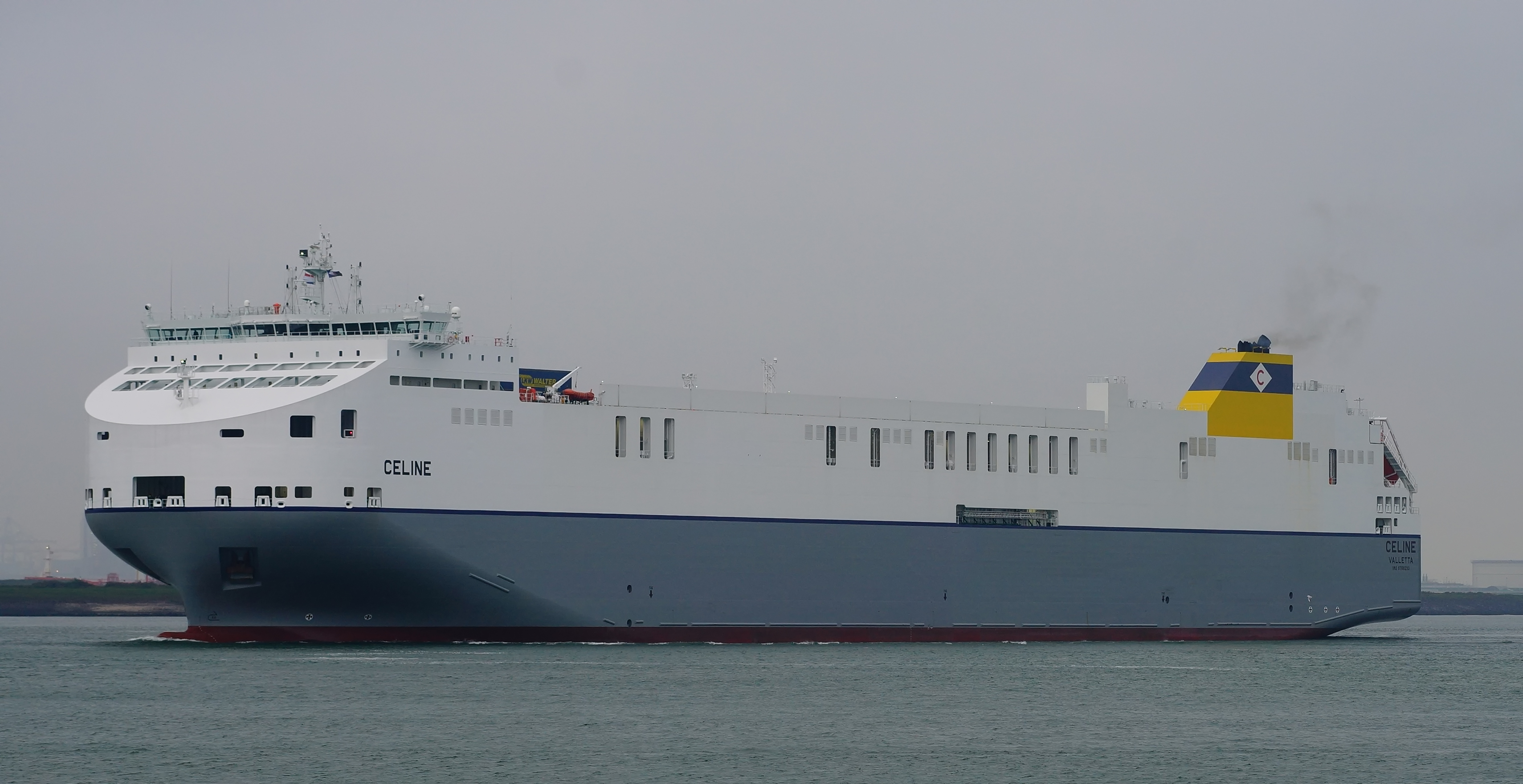 Eerste aankomst in Rotterdam van het grootste shortsea RoRo (rollon/rolloff) schip ter wereld